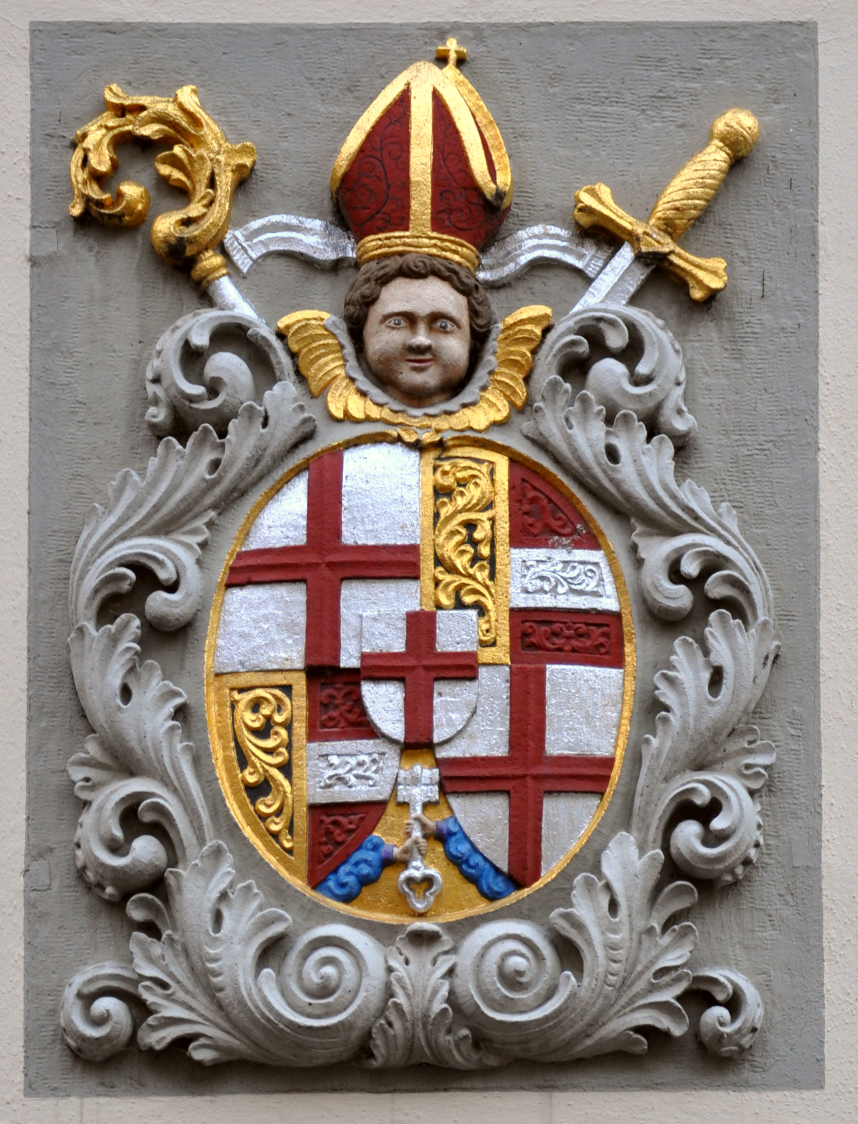 Meersburg am Bodensee, "Pfarrhof" am Schlossplatz, Rückseite zur Vorburggasse, Wappen des Konstanzer Fürstbischofs Marquard Rudolf von Rodt , 1700